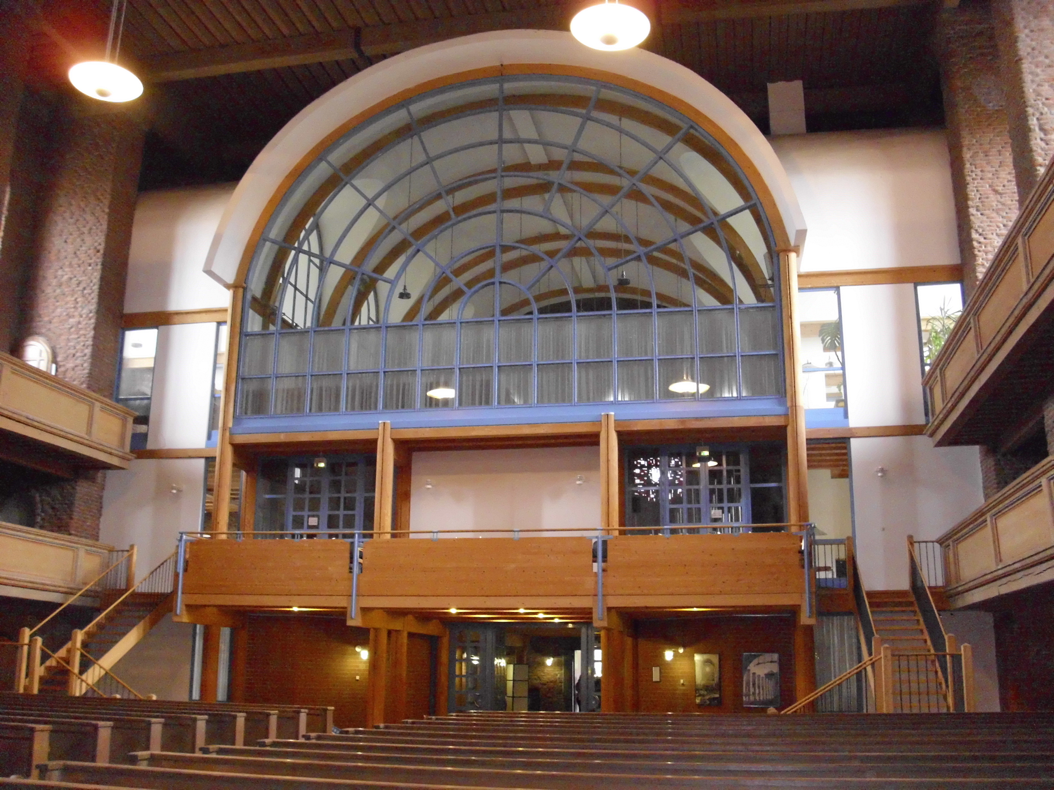 Gustav-Adolf-Gedächtniskirche Allersberger Straße 114 Juli 2010 10